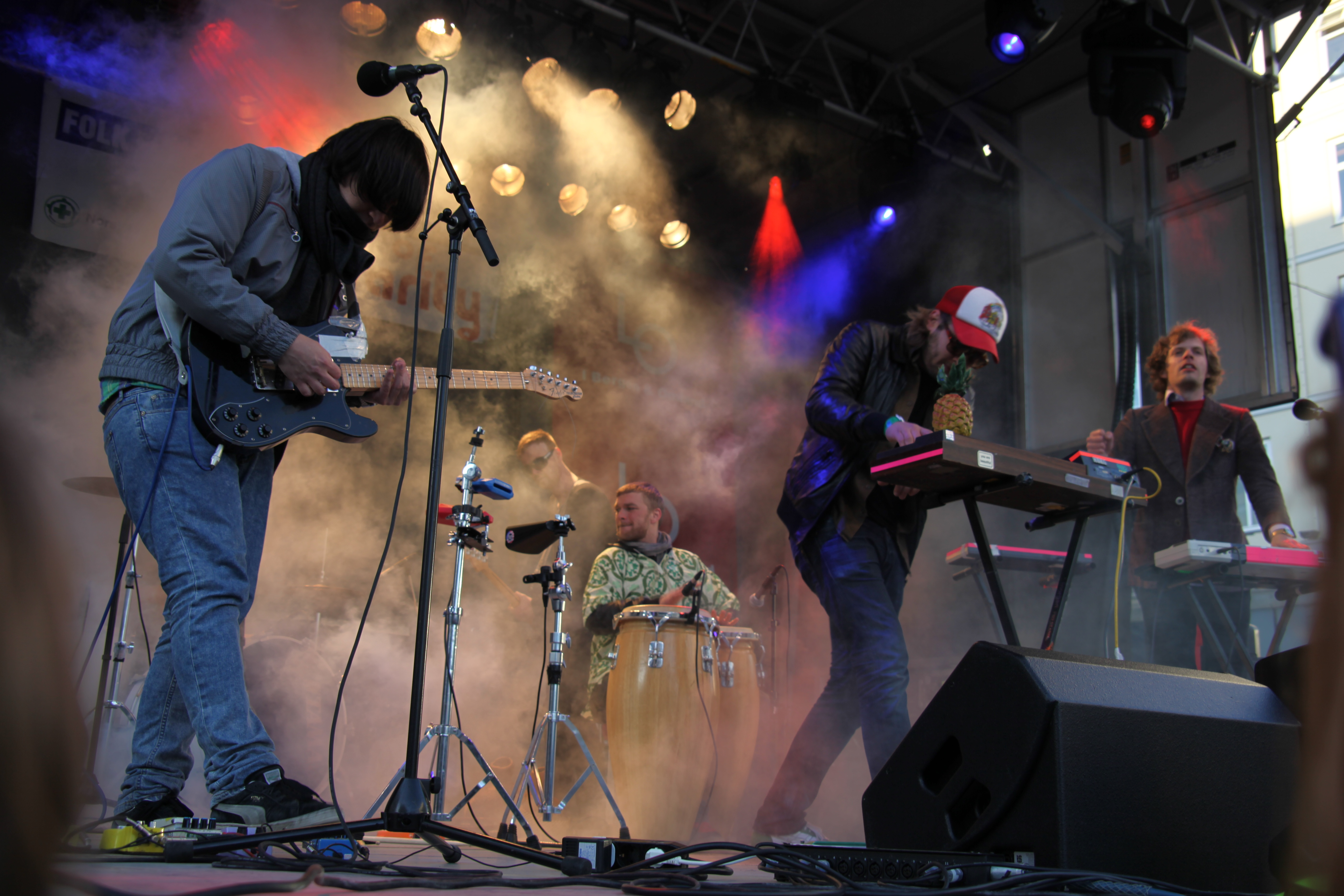 Norsk (bokmål): Casiokids